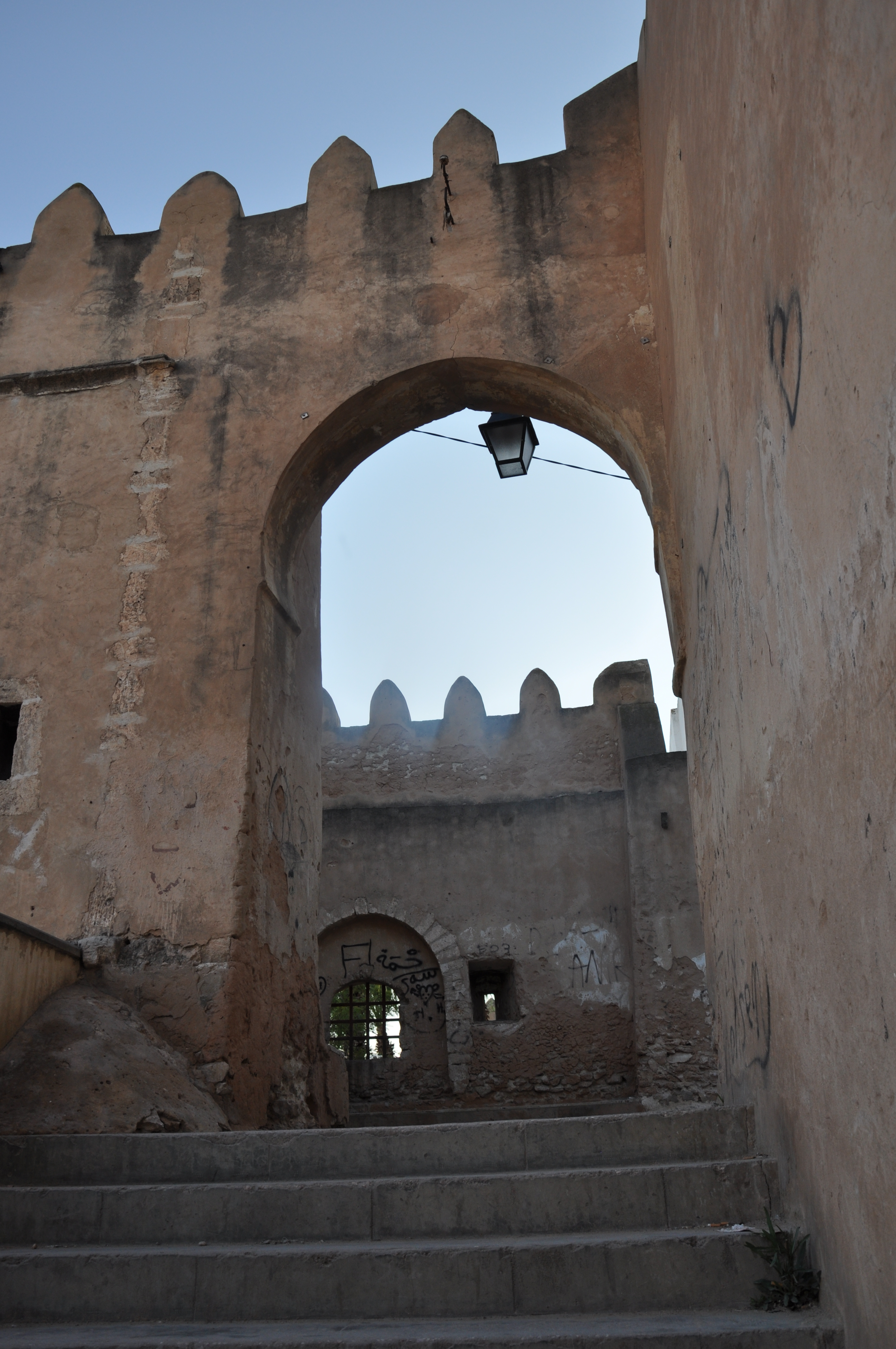 Remparts